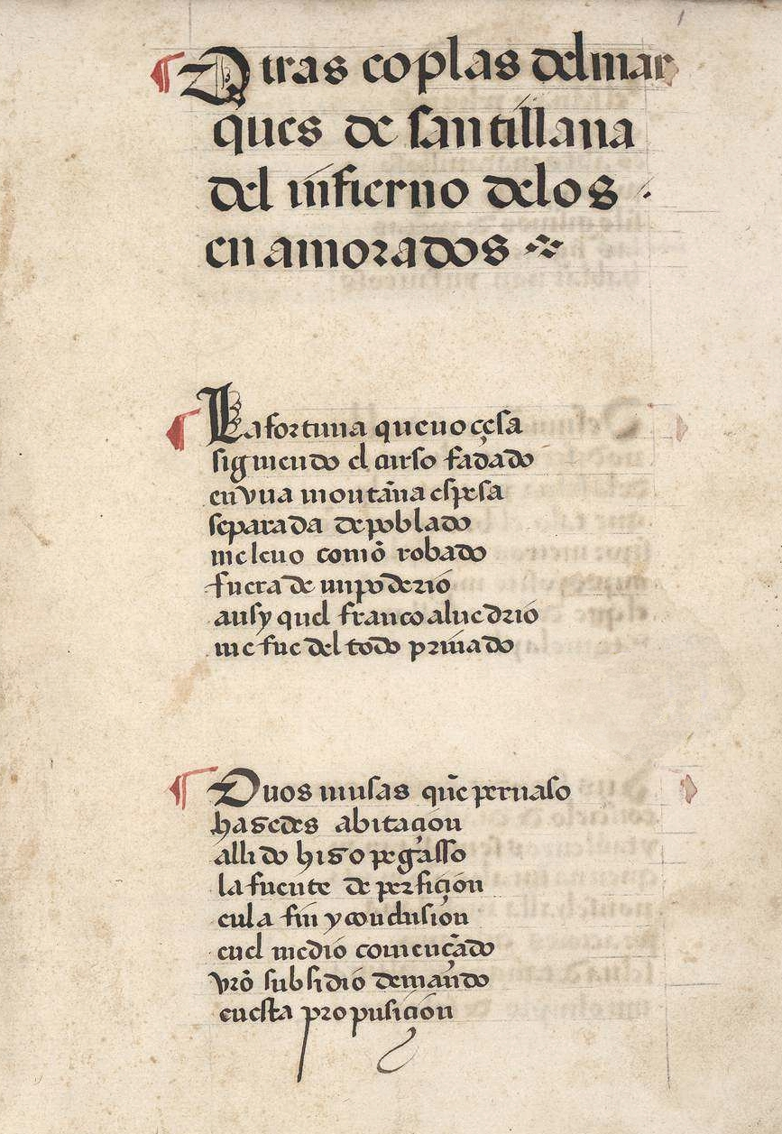 Manuscrito con poesías del Marqués de Santillana. Siglo XV